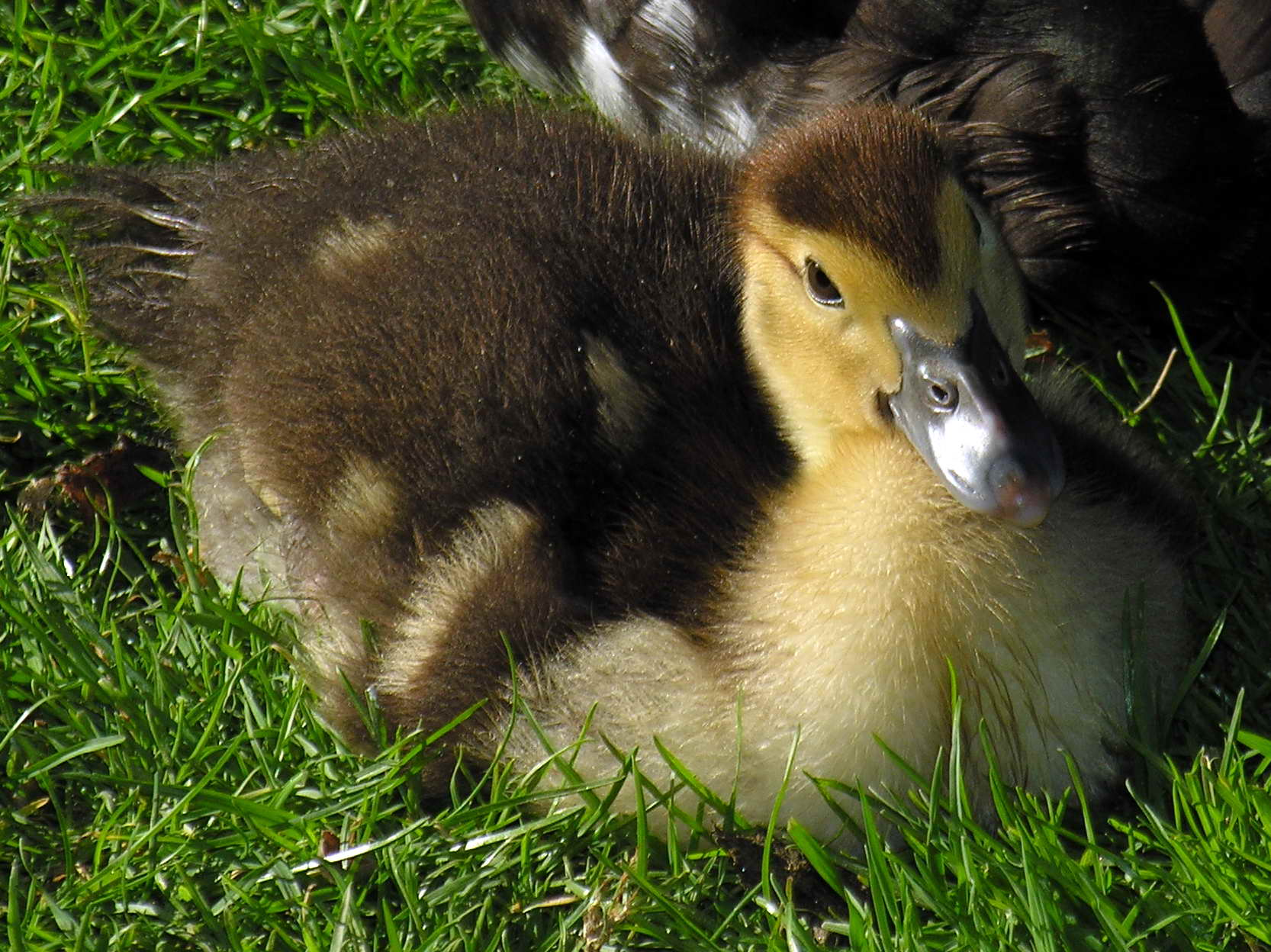 self made. Bastabales - Galicia - Spain